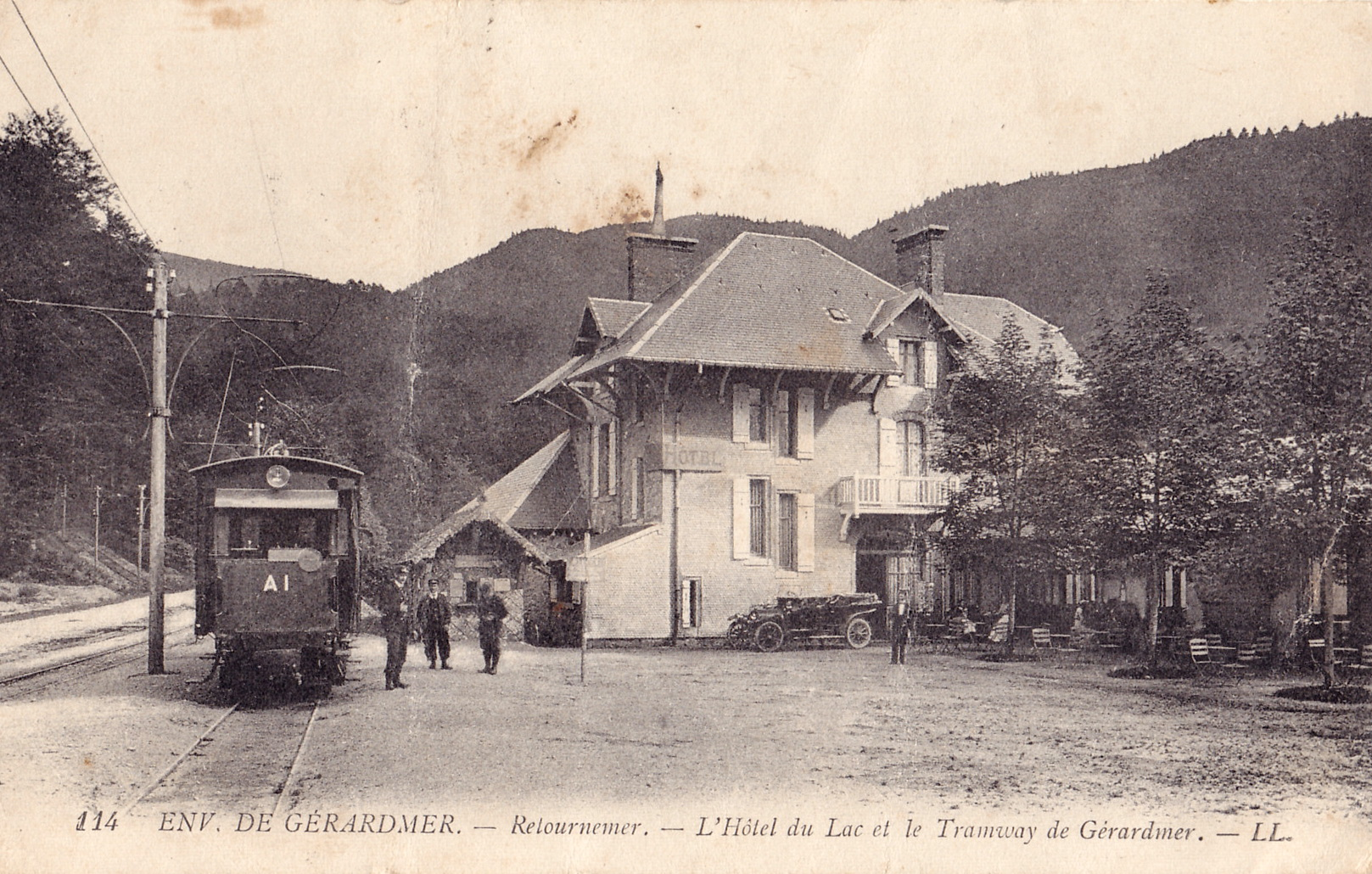 Carte postale ancienne éditée par LL, n°114 : Environs de GERARDMER - Retournemer - L'Hotel du Lac et le Tramway de Gérardmer